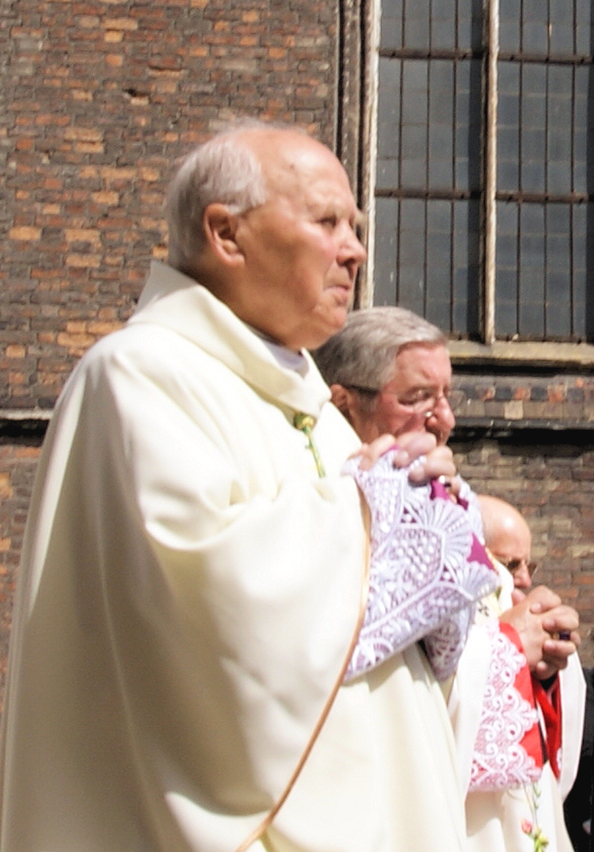 Biskup Tadeusz Gocłowski w czasie procesji w Gdańsku, rok 2011.